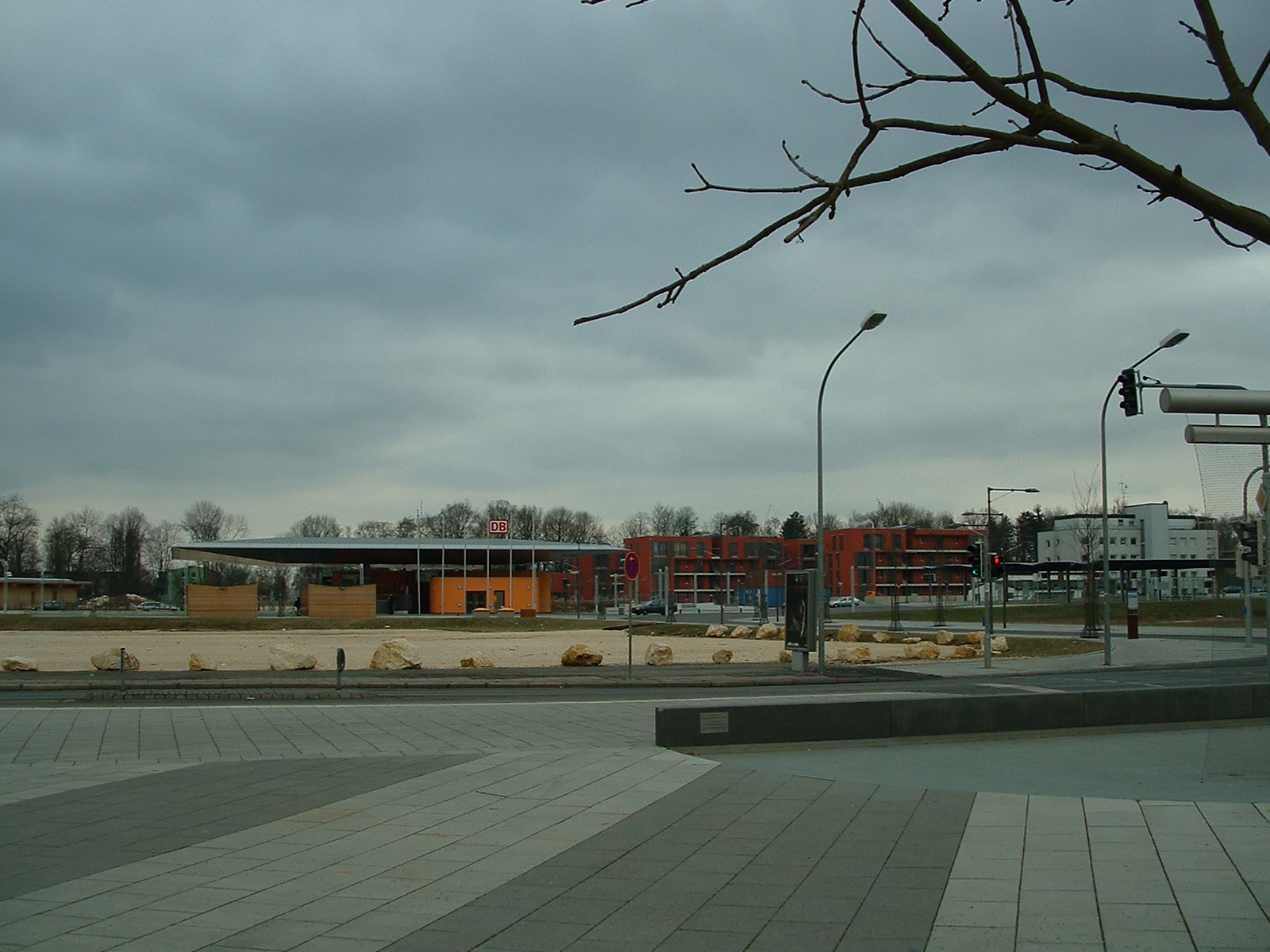 Bahnhof Neu-Ulm (Bayern)